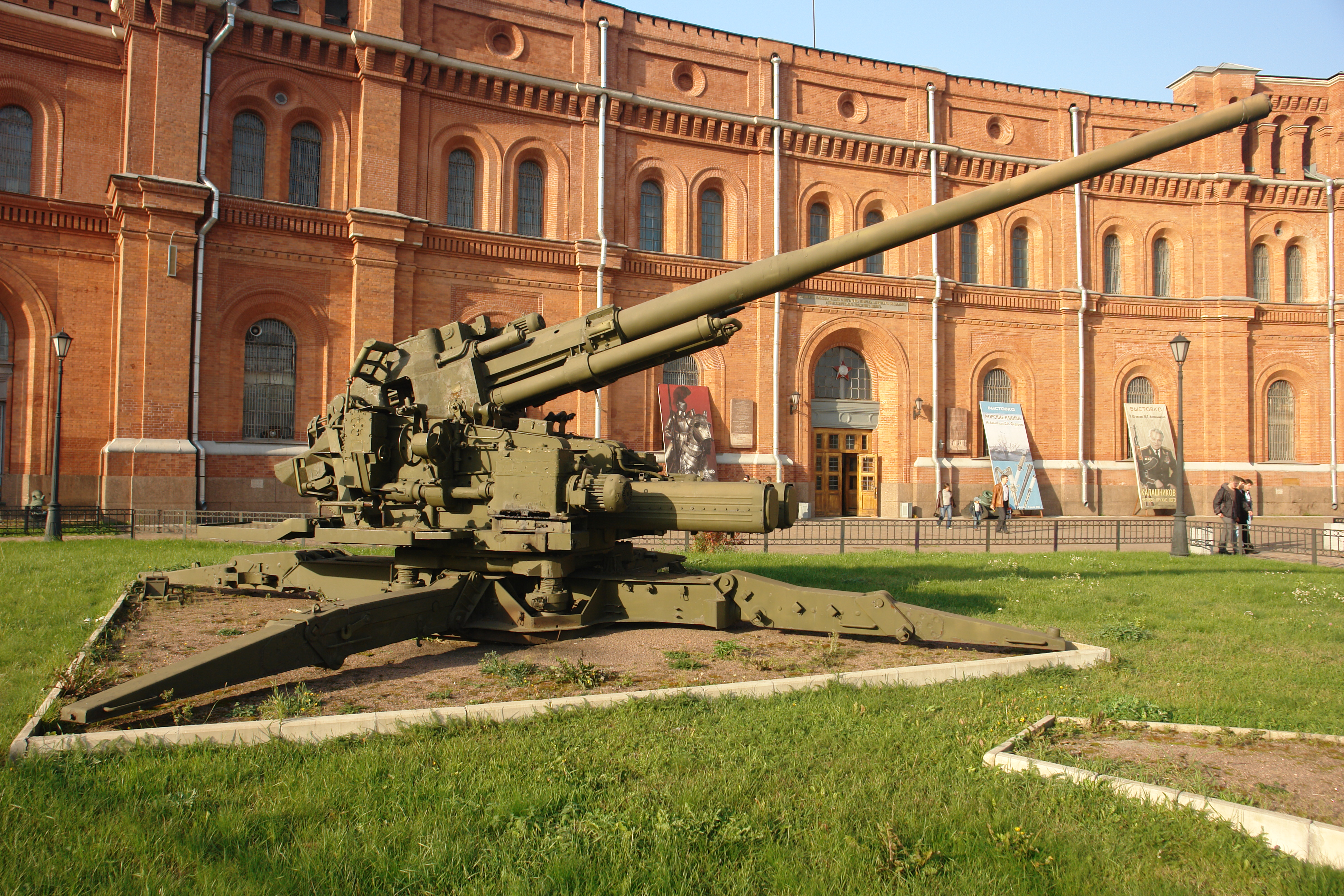 130-мм зенитная пушка КС-30 (1952) Главный конструктор Л.В. Люльев. Досягаемость стрельбы, м: по высоте - 20600, по дальности - 27500. Скорострельность -12 выстр/мин. Масса, кг: орудия - 23500, снаряда - 33. Расчет -10 человек. Военно-исторический музей артиллерии, инженерных войск и войск связи, Санкт-Петербург.